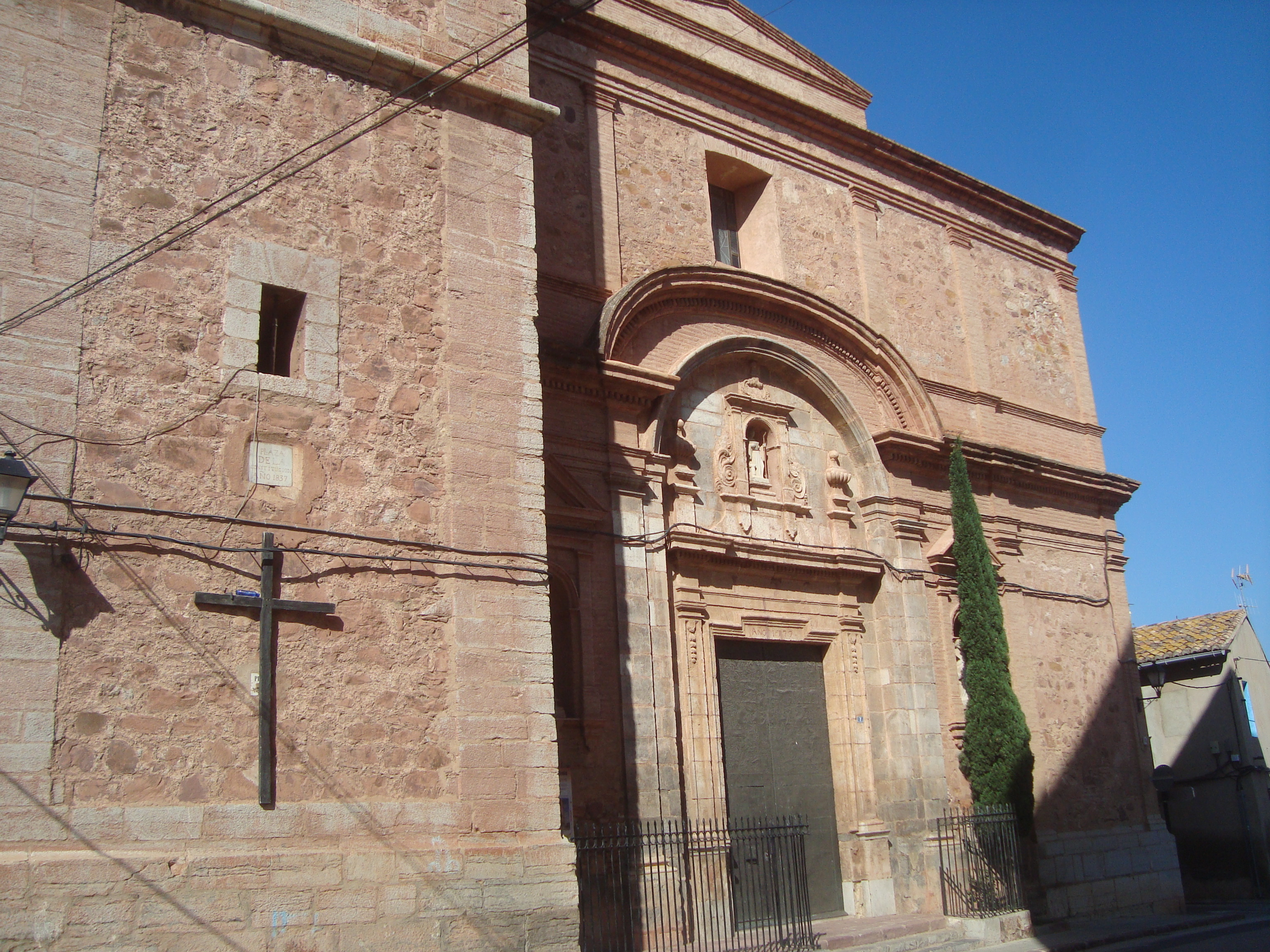 Església parroquial de Sant Gil Abat (Benifairó de les Valls) 12.058-001.